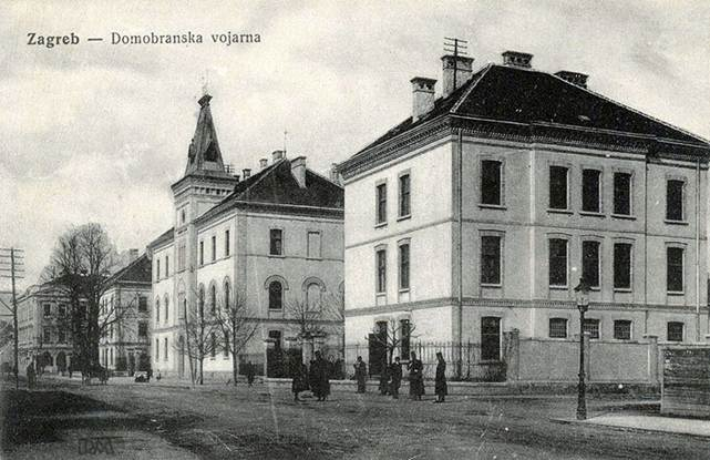 Domobranska vojarna u Zagrebu 1889.